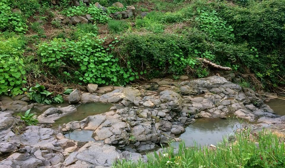 Chabocos formados en el barranco de San Jerónimo a su paso por el Callejón Grande